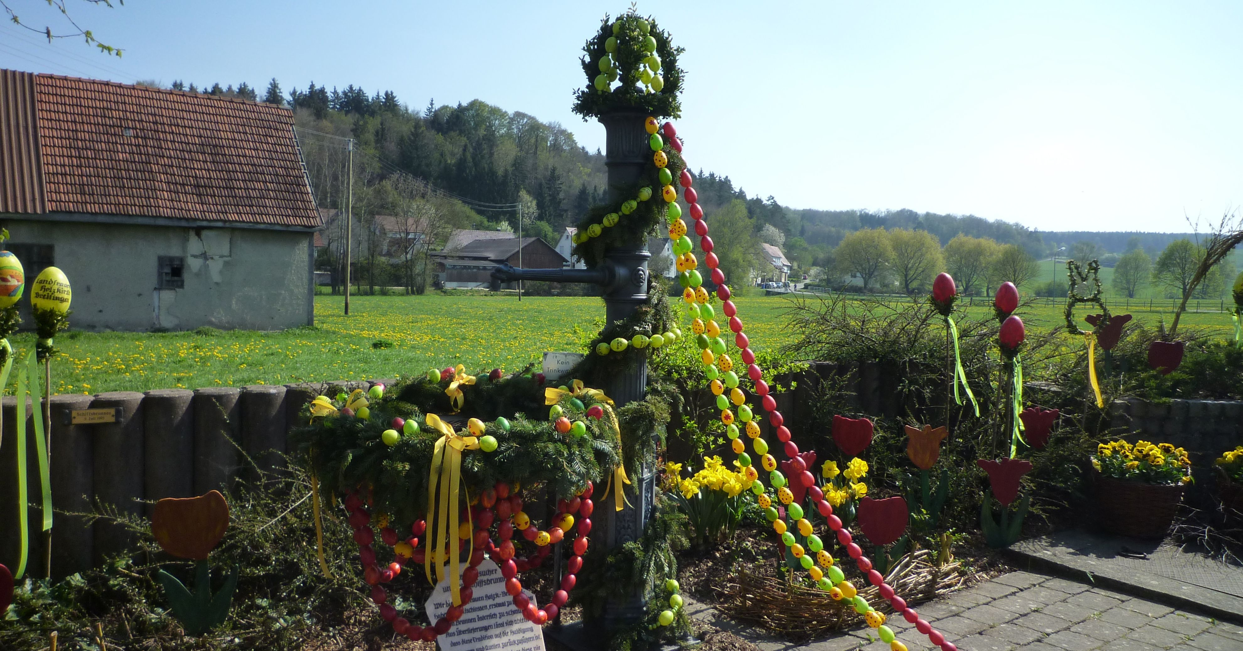 Breitingen im Lonetal - Osterdekoration des Schiffbrunnens03